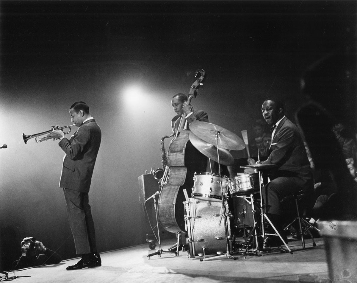 Concert van Art Blakey in het Concertgebouw, Amsterdam, 17 december 1960 Foto Ben van Meerendonk / AHF, collectie IISG, Amsterdam